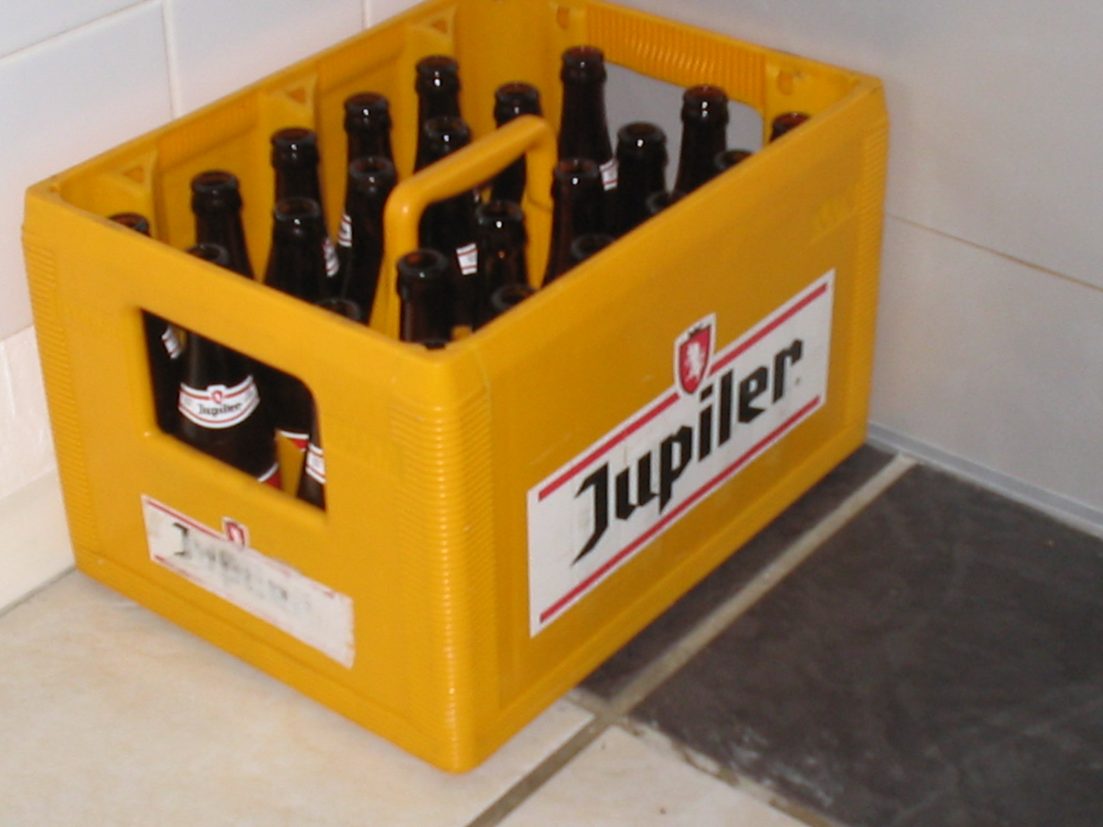 kratje Jupiler (leeg helaas) Categorie:Afbeelding bier